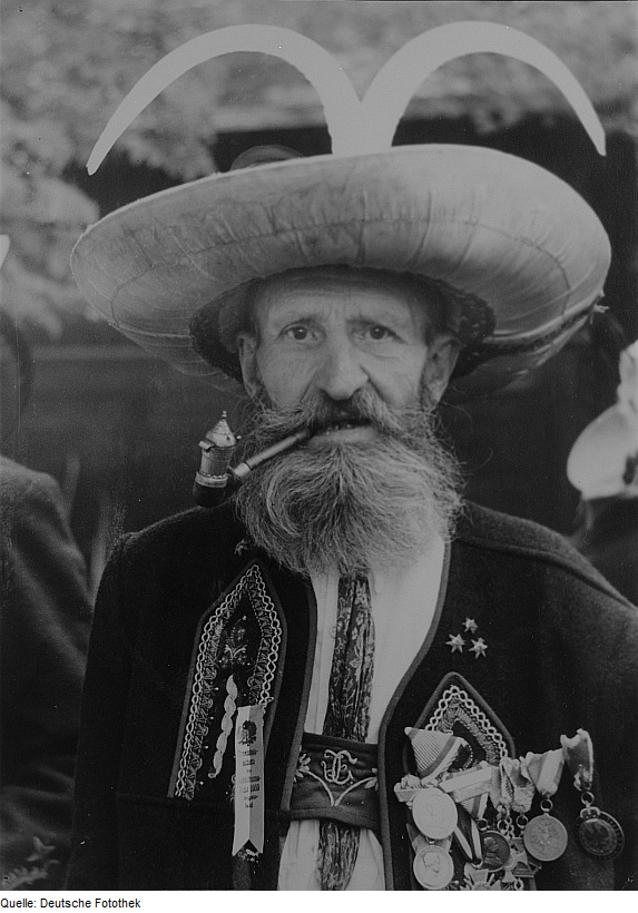 Original image description from the Deutsche Fotothek Tiroler in Festtracht aus dem Ötztal